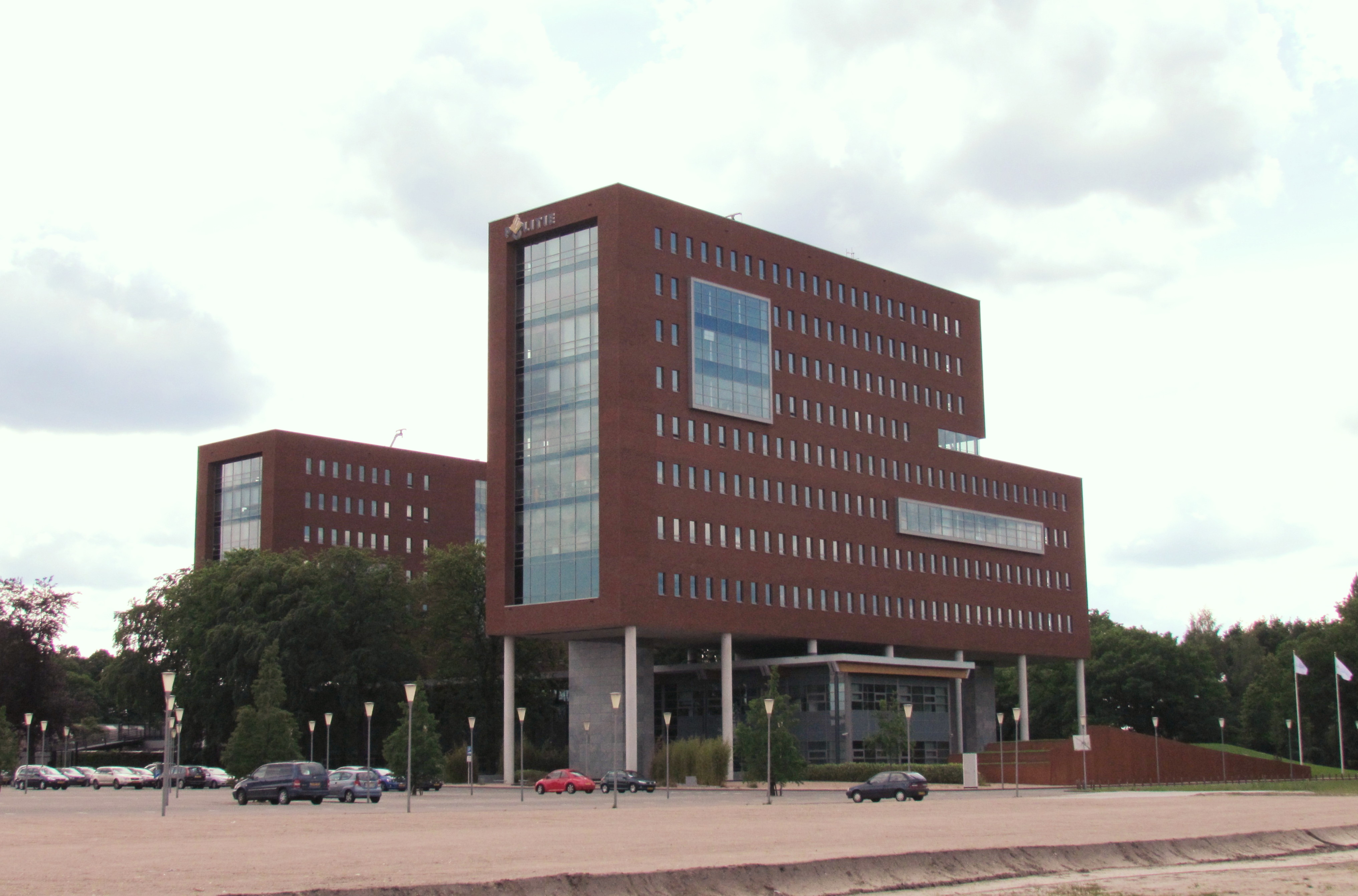 Het begin 2009 in gebruik genomen hoofdbureau van politie en brandweer in de regio Noord- en Oost-Gelderland, aan de Europaweg te Apeldoorn. Huisvest onder meer de regionale meldkamer, een cellencomplex, technische recherche forensische laboratoria. Architecten: Gerrie de Bruin en Hijlko van der Woude